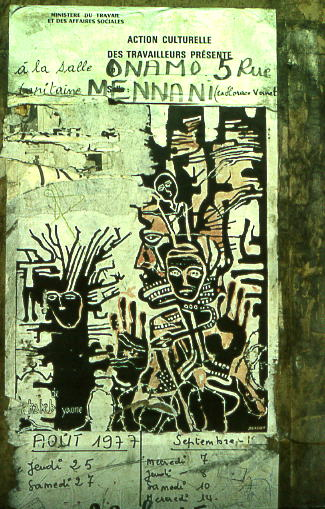 Mur d'une rue d'Alger (Algérie) : affiche, pour une pièce de théâtre de l'écrivain Kateb Yacine, créée par le peintre M'hamed Issiakhem